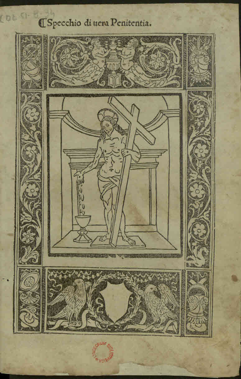 Specchio di vera penitentia. - Impresso in Firenze : [Bartolomeo de' Libri], A di XII di marzo MCCCCLXXXXV. - 148 c. ; a⁴, b-t⁸ ; 4º .